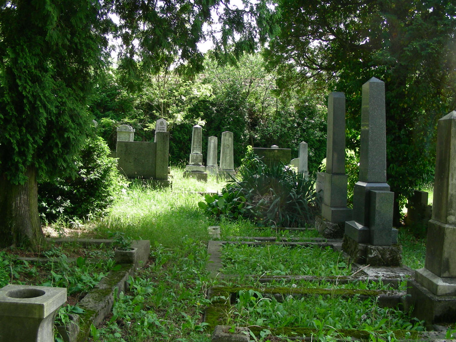 der verlassene Judenfriedhof von Lendava